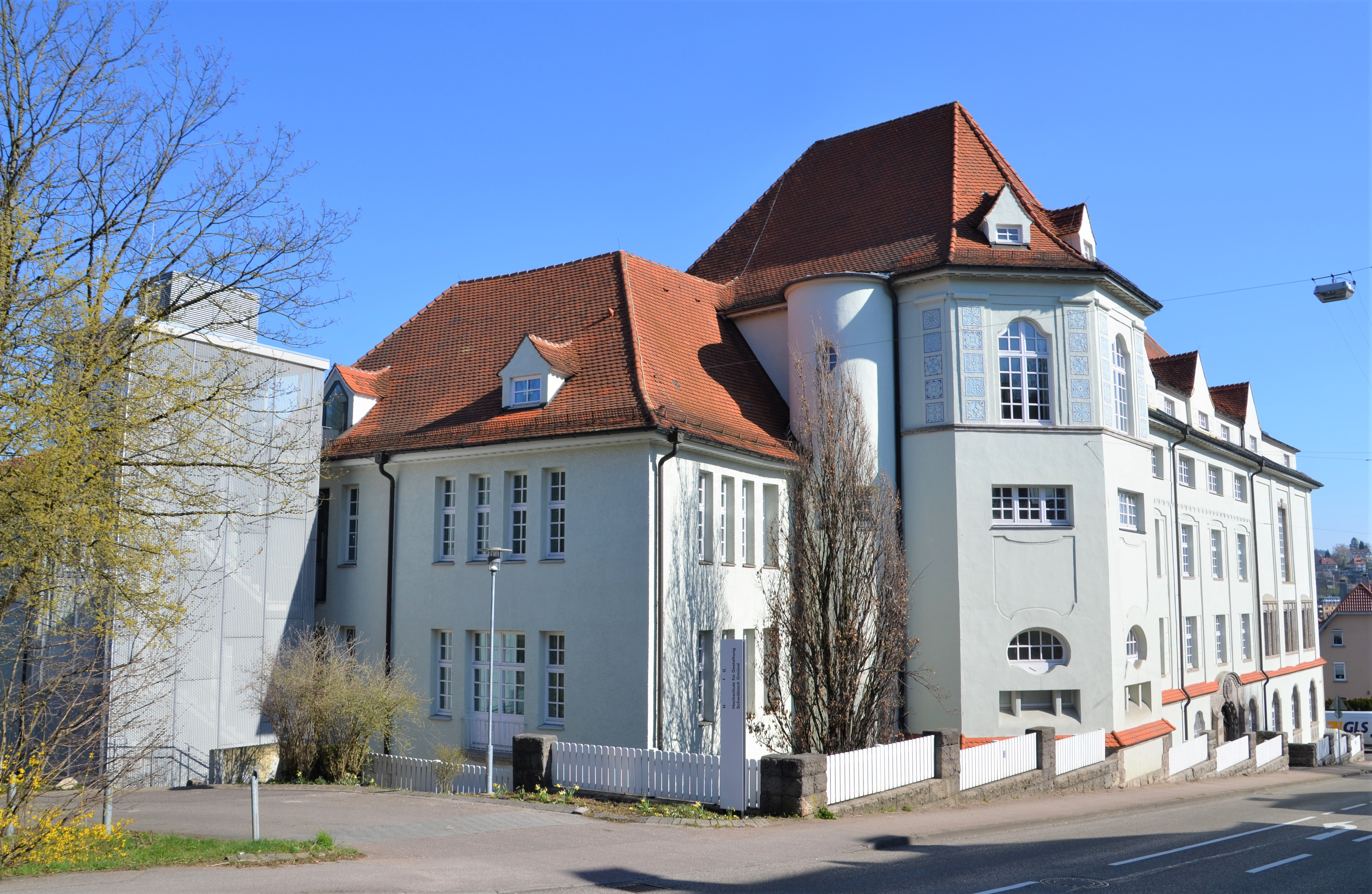 HfG Gmünd, Elseasserbau von Südwest, Schwäbisch Gmünd